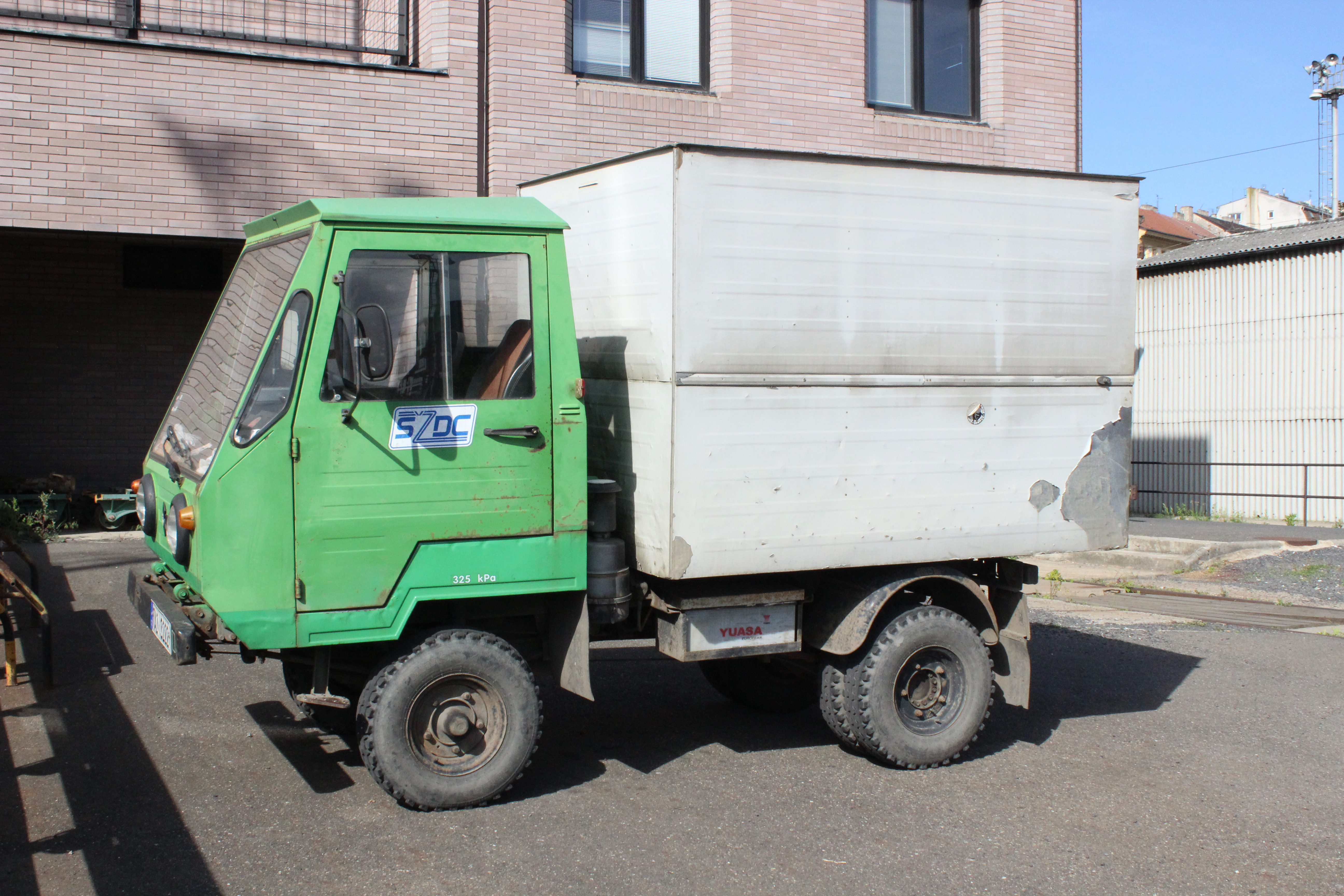 Skříňový vůz Multicar M 25 stojící na pražském Hlavním nádraží.